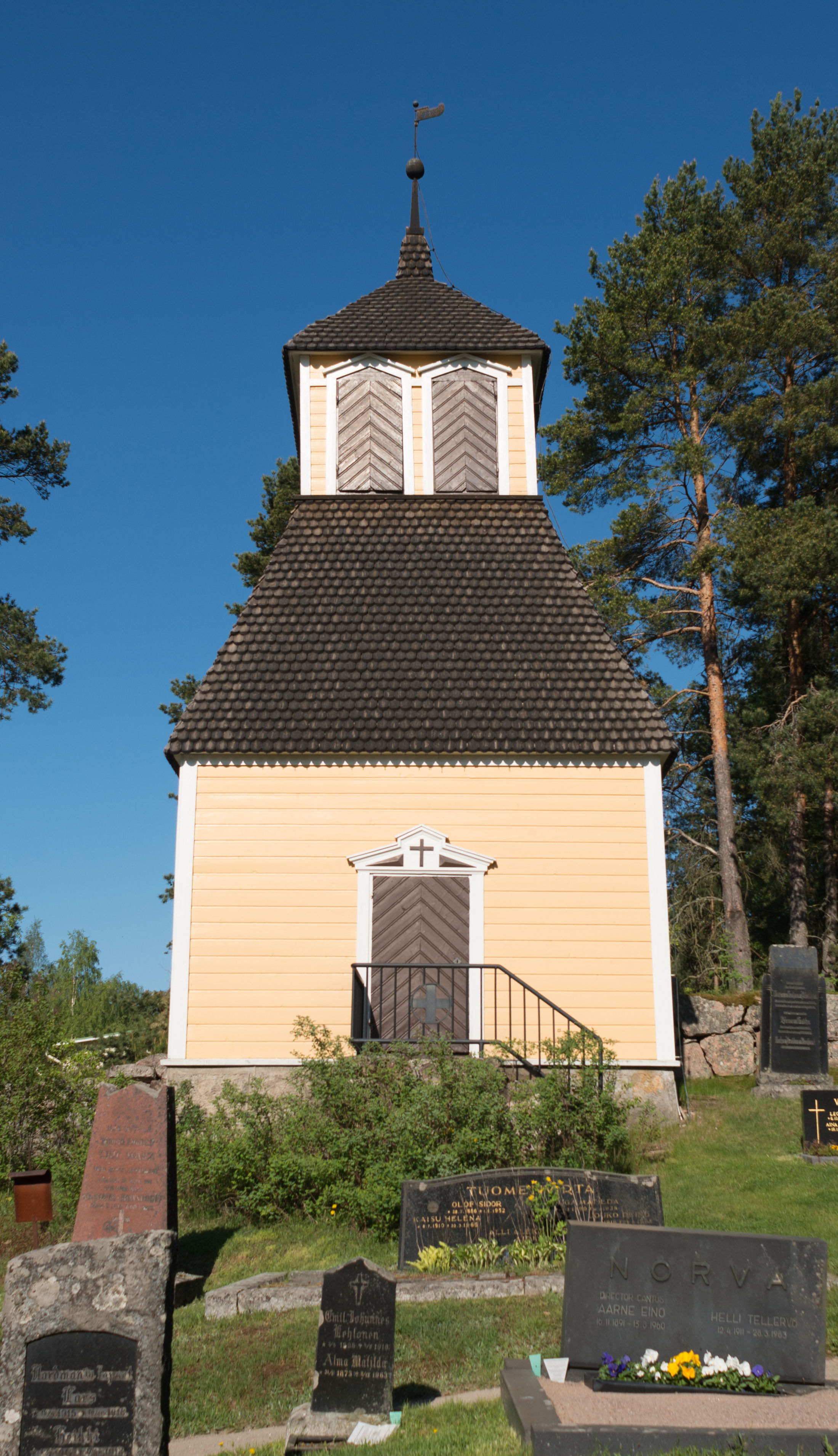 Muurlan kirkon kellotapuli